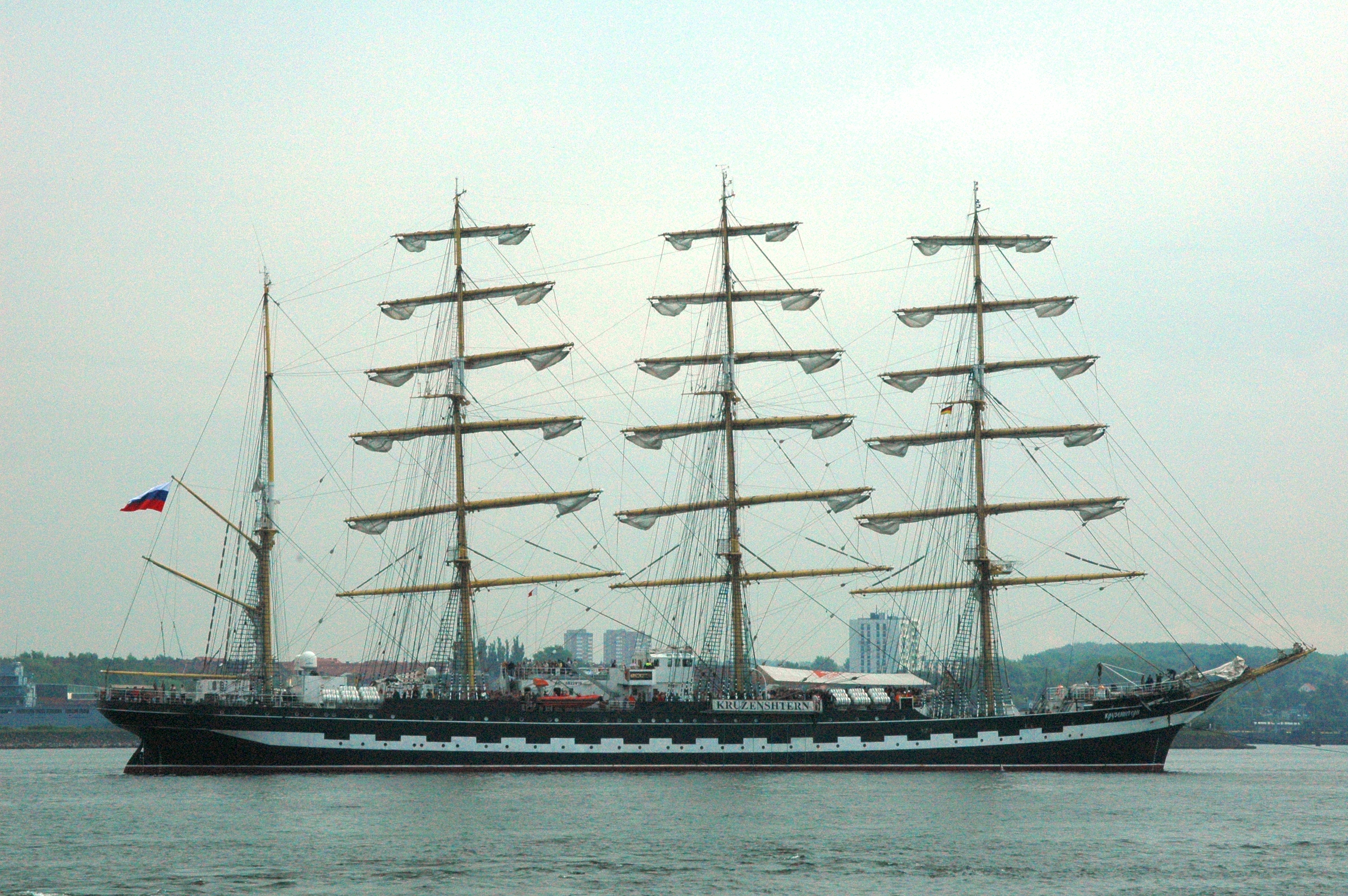 Die Krusenstern bei der Kieler Woche 2007